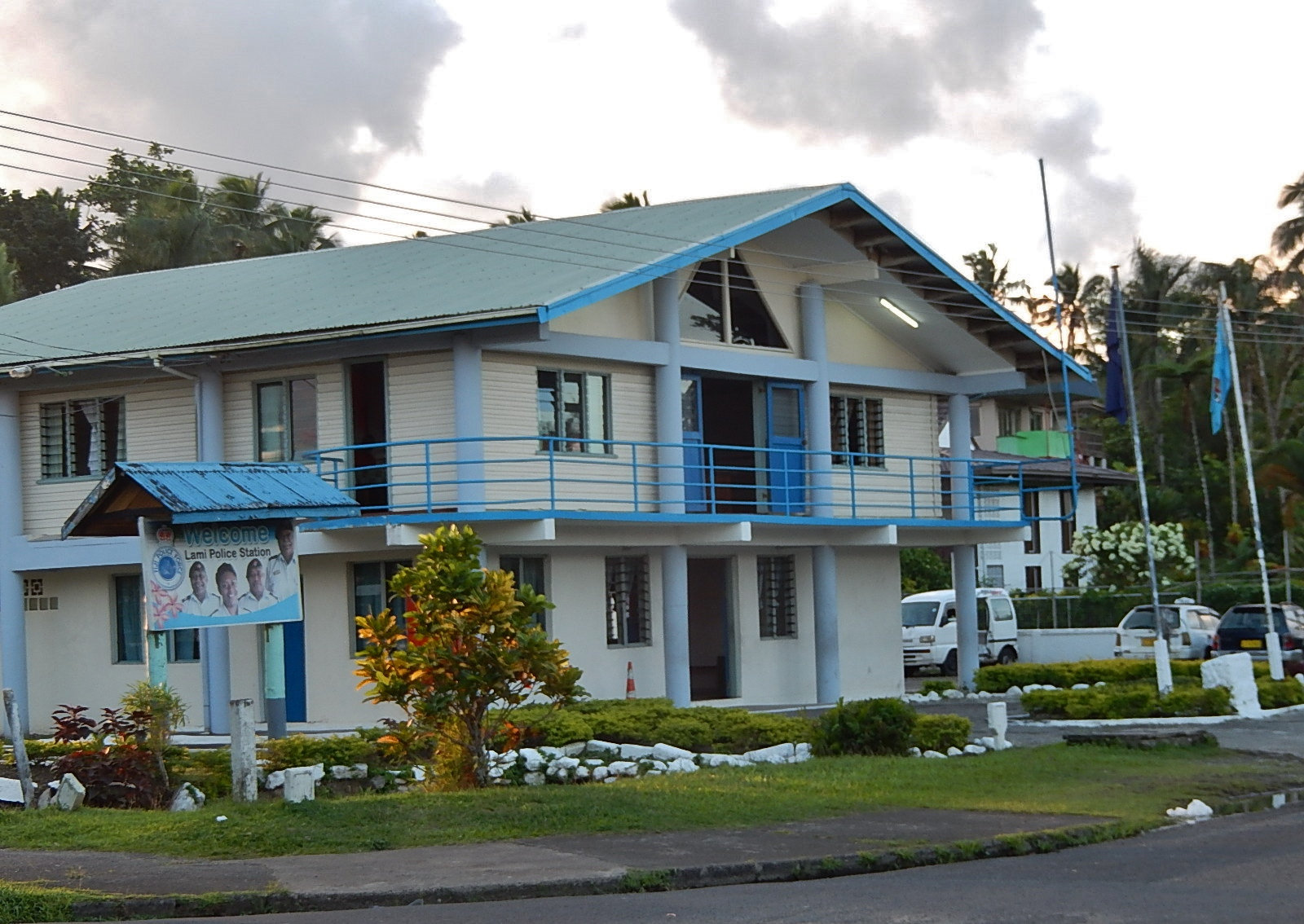 Police station, Lami, Fiji